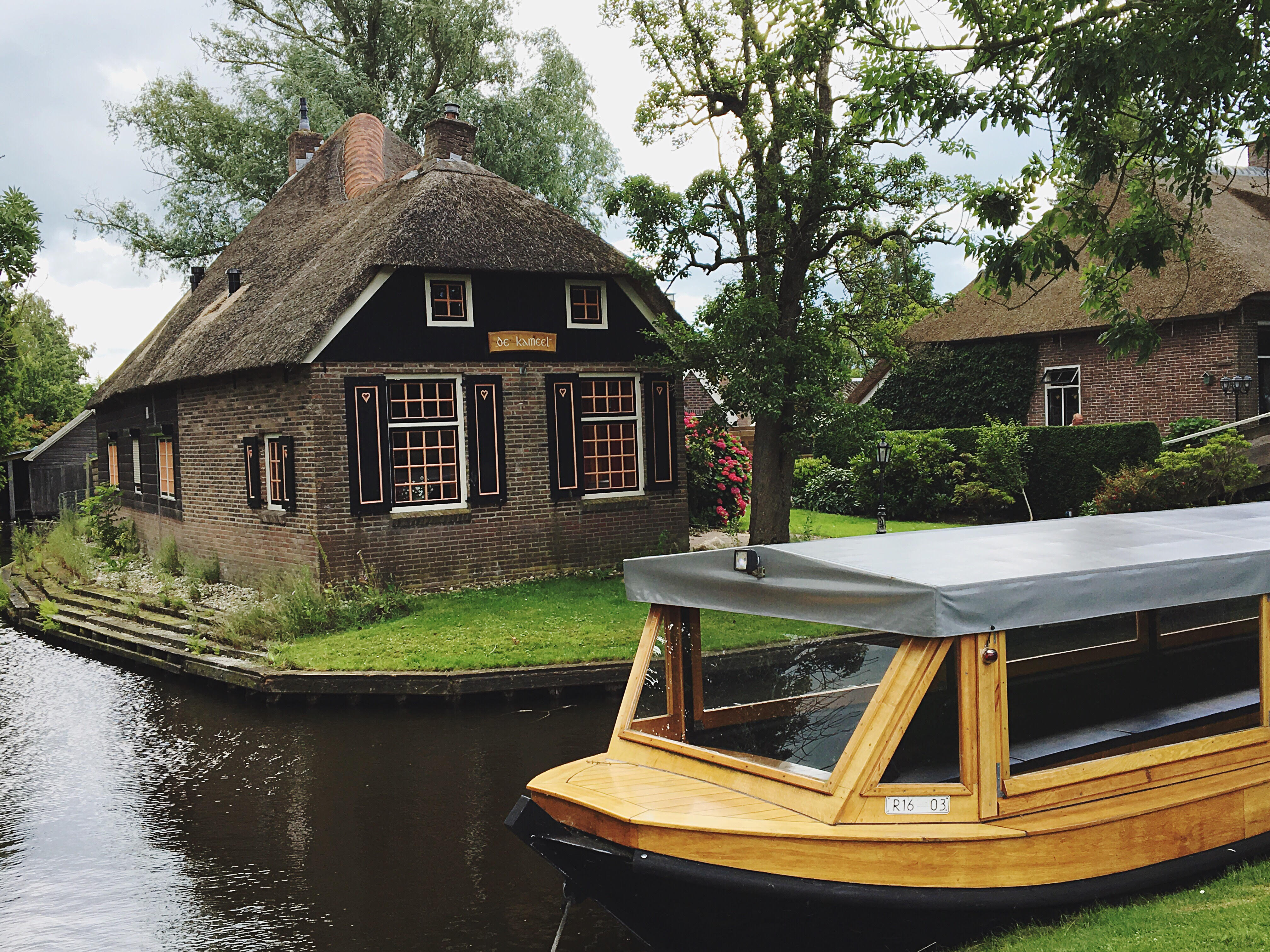 העיר חיטהורן בהולנד.